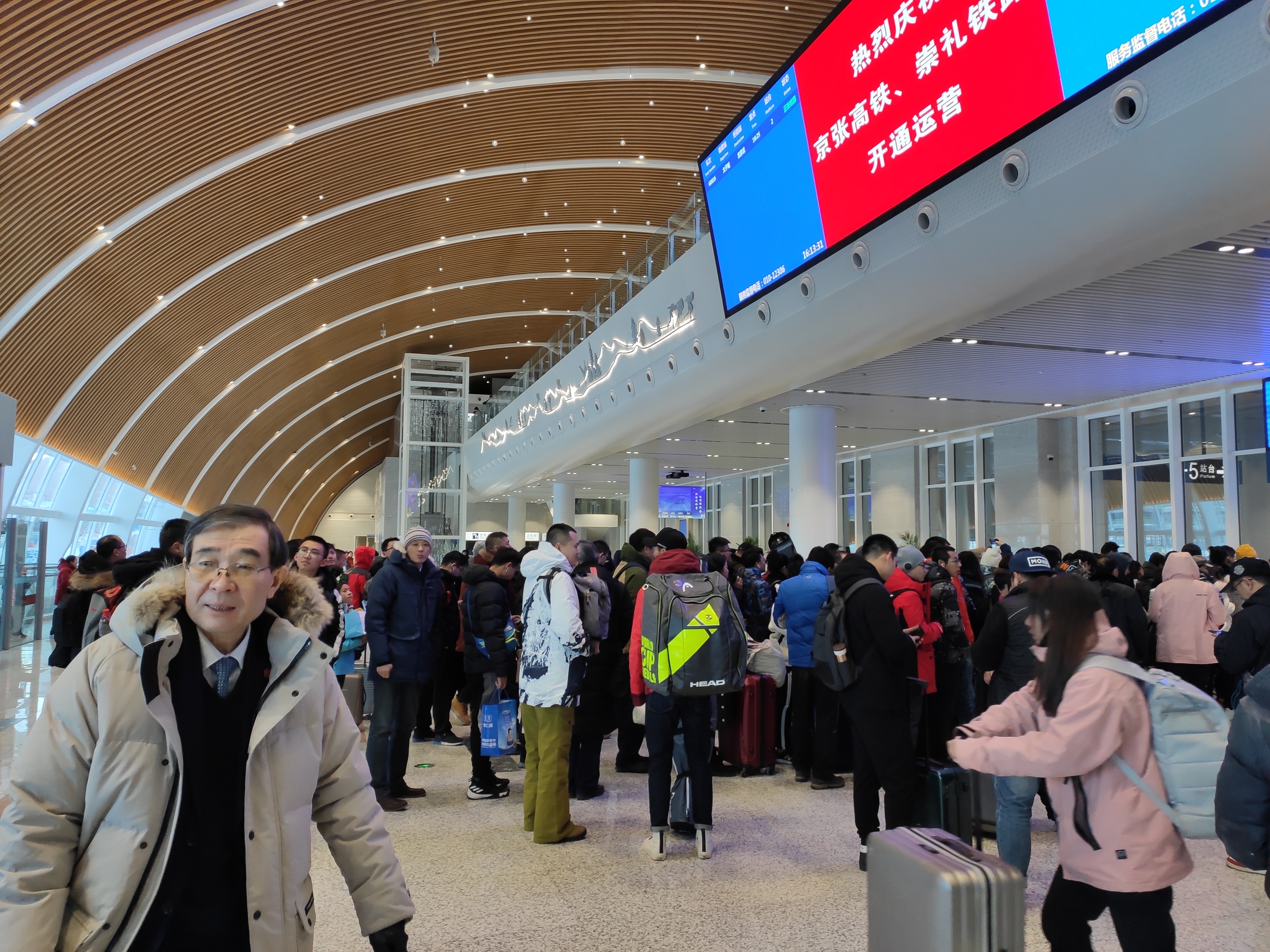 中文（中国大陆）: 非正常客流。